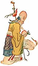 Shouxin - um dos "imortais" chineses que simboliza a longevidade